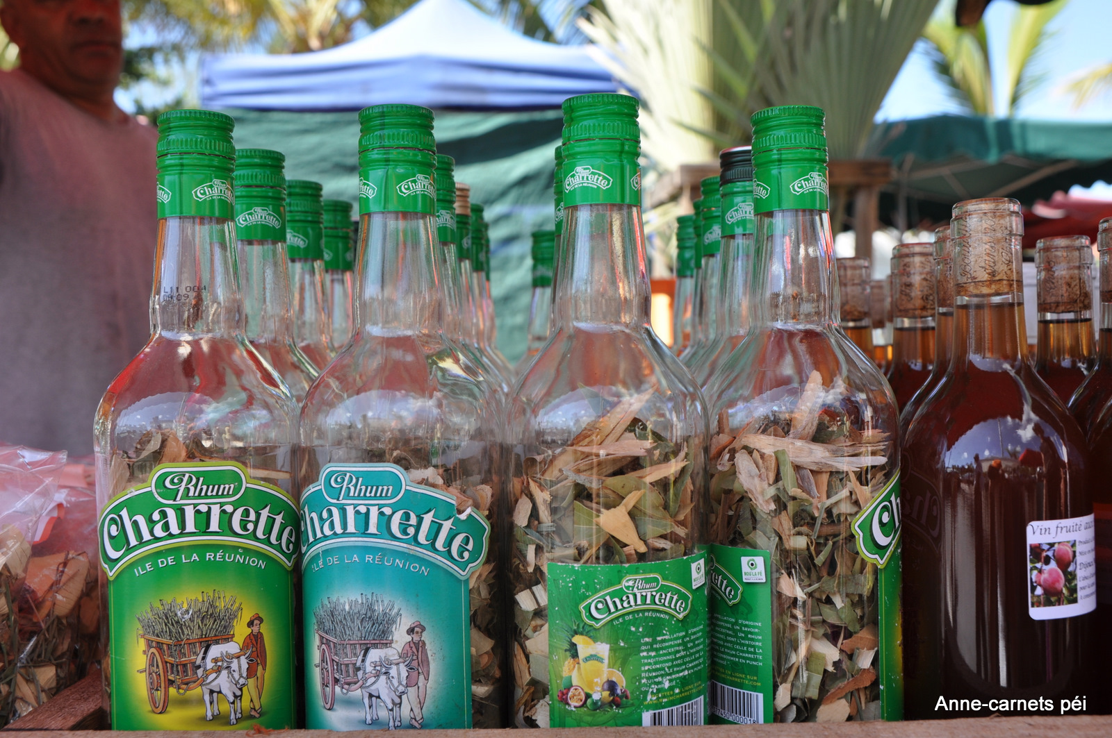 tisane marché forain saint pierre